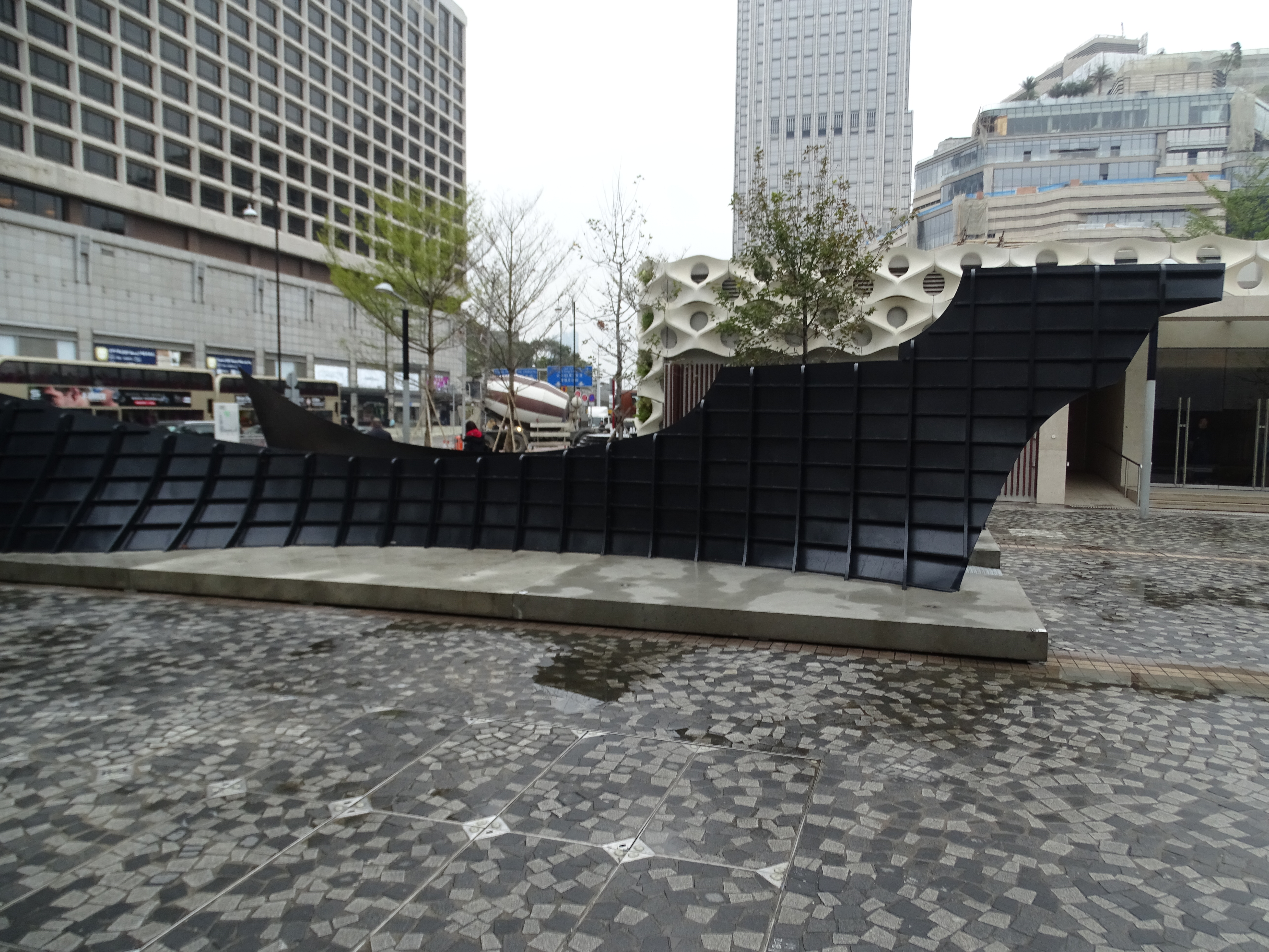 Skulptur "Time Slip" von Stanley Siu, Art Square at Salisbury Garden / Hong Kong Cultural Centre Complex HKCCC, Ausstellung "Growing City．Growing Home", geöffnet am 8. Dezember 2017, Kowloon, Hong Kong